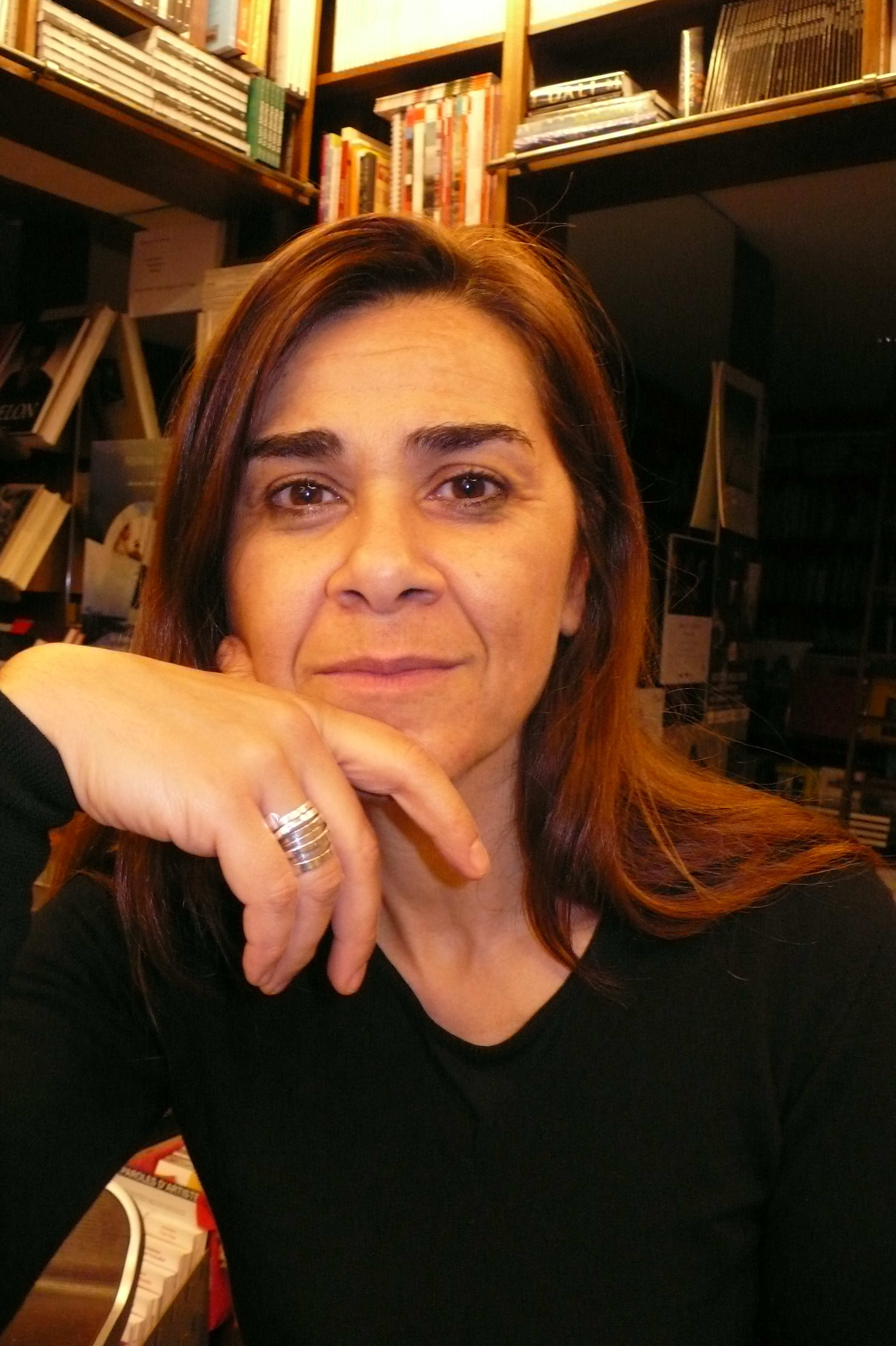 Négar Djavadi.Portrait de l'auteure.